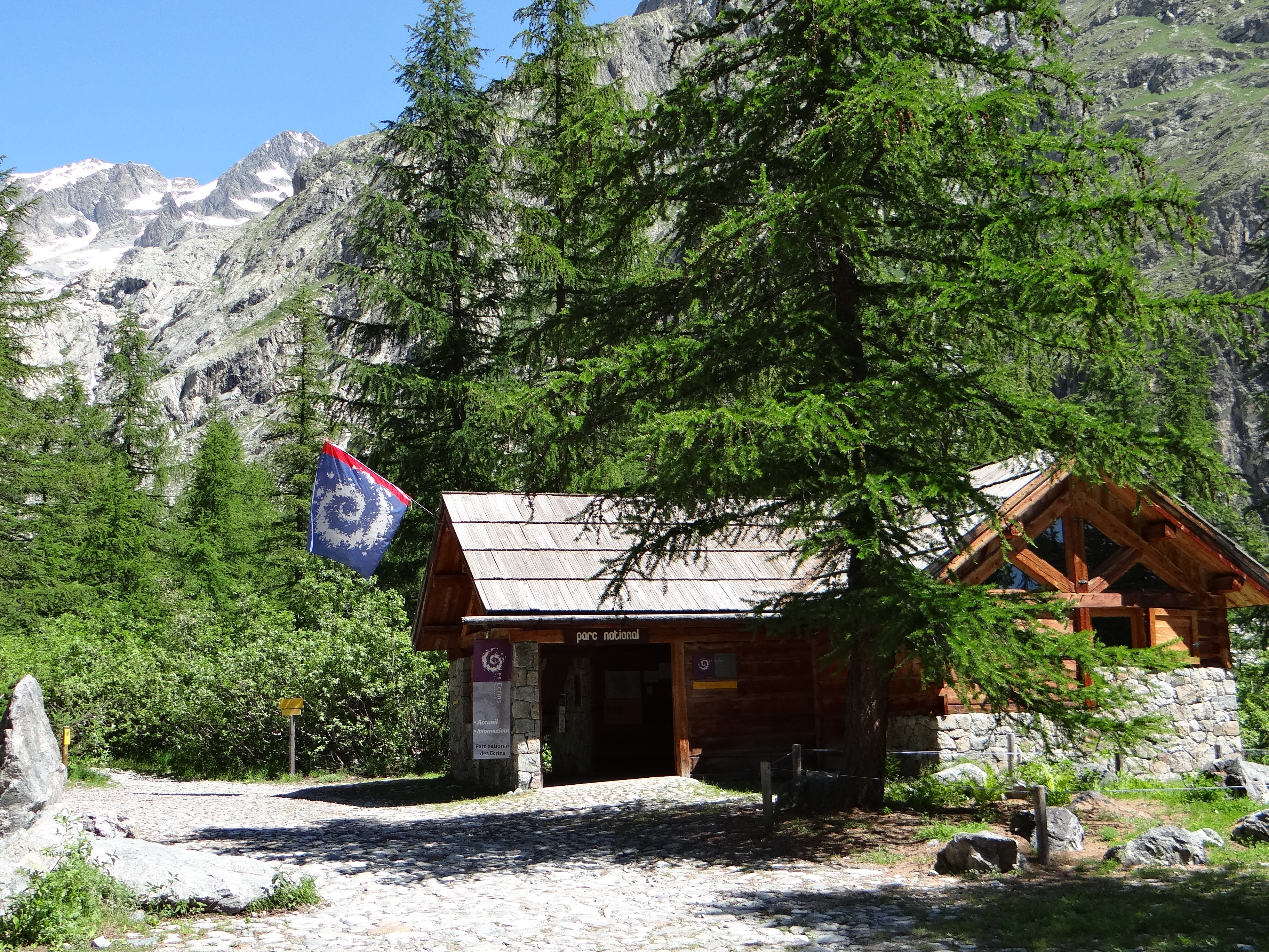 Pré de Madame Carle - Chalet d'information du Parc